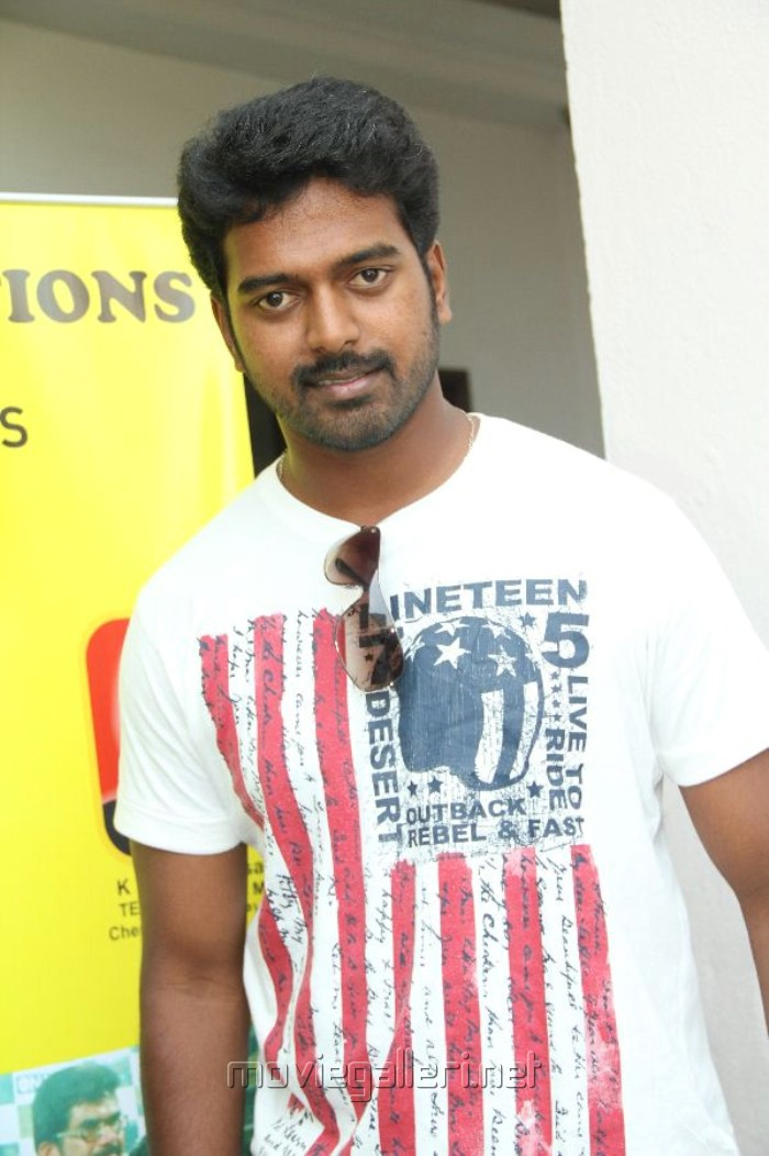 Vikranth